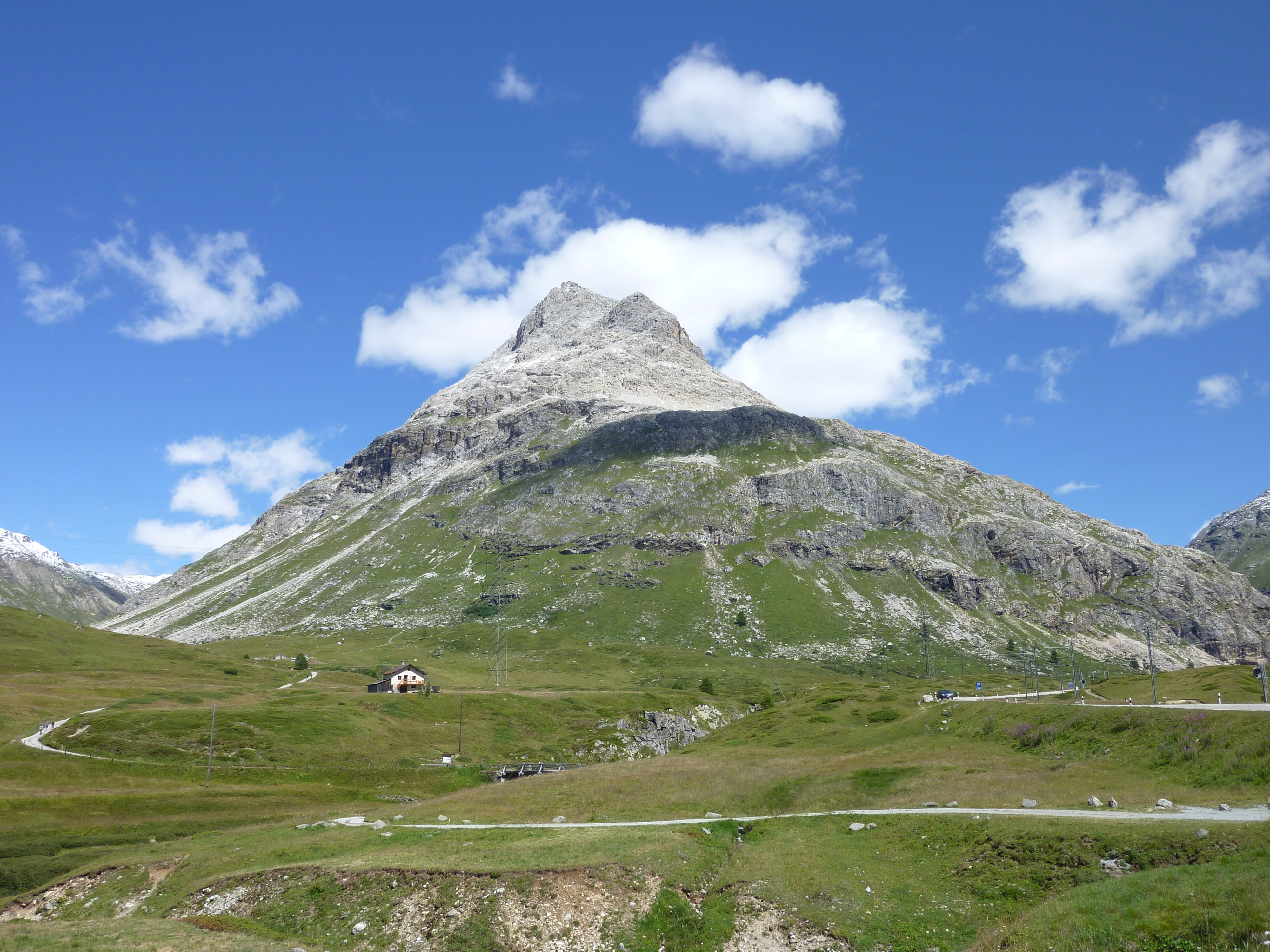 Piz Alv im Val Bernina